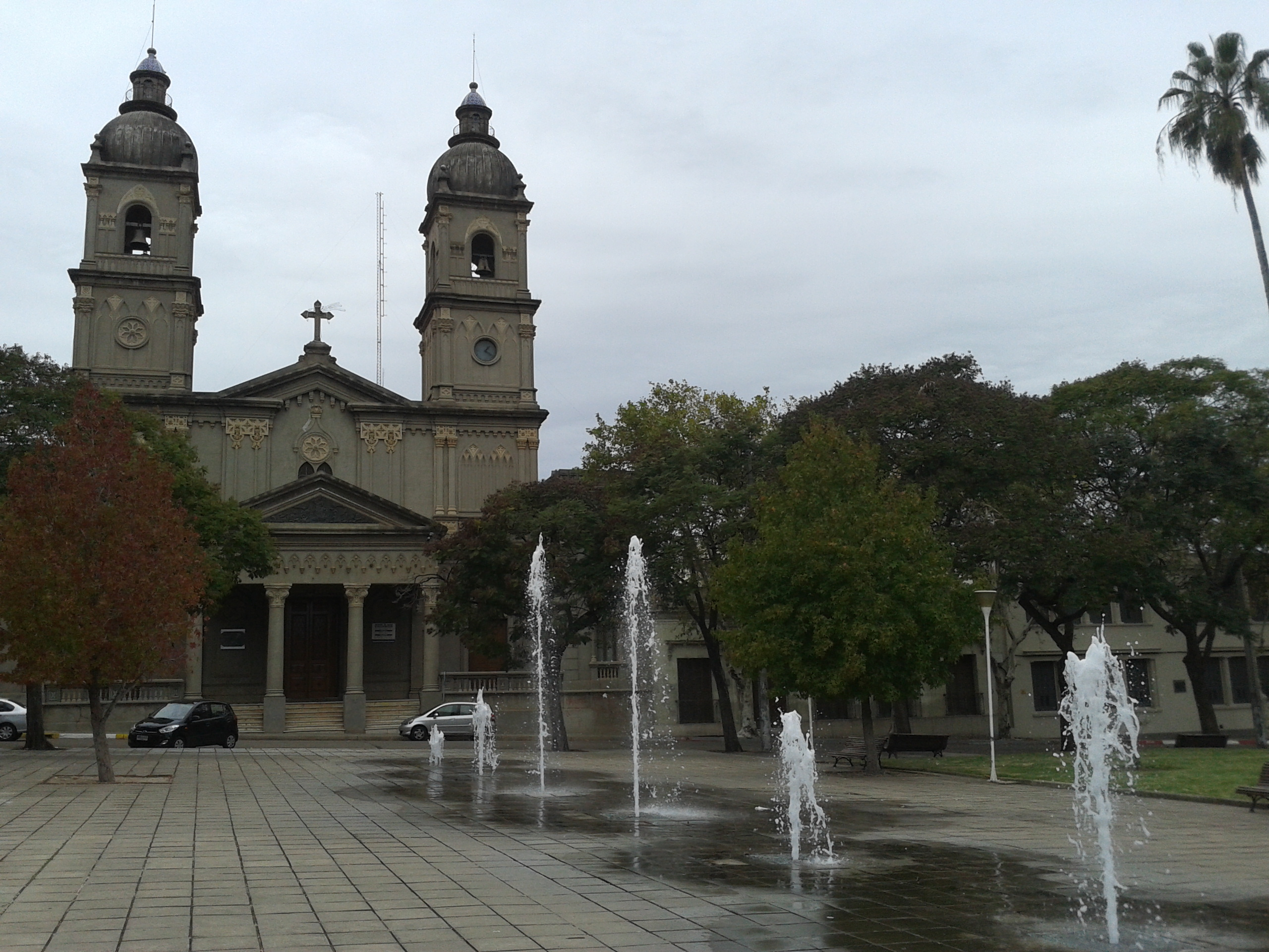 Plaza de los Treinta y Tres. Ubicada en el departamento de Salto